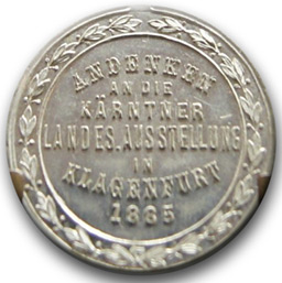 Gedenkmuenze Kaerntner-Landesausstellung 1885